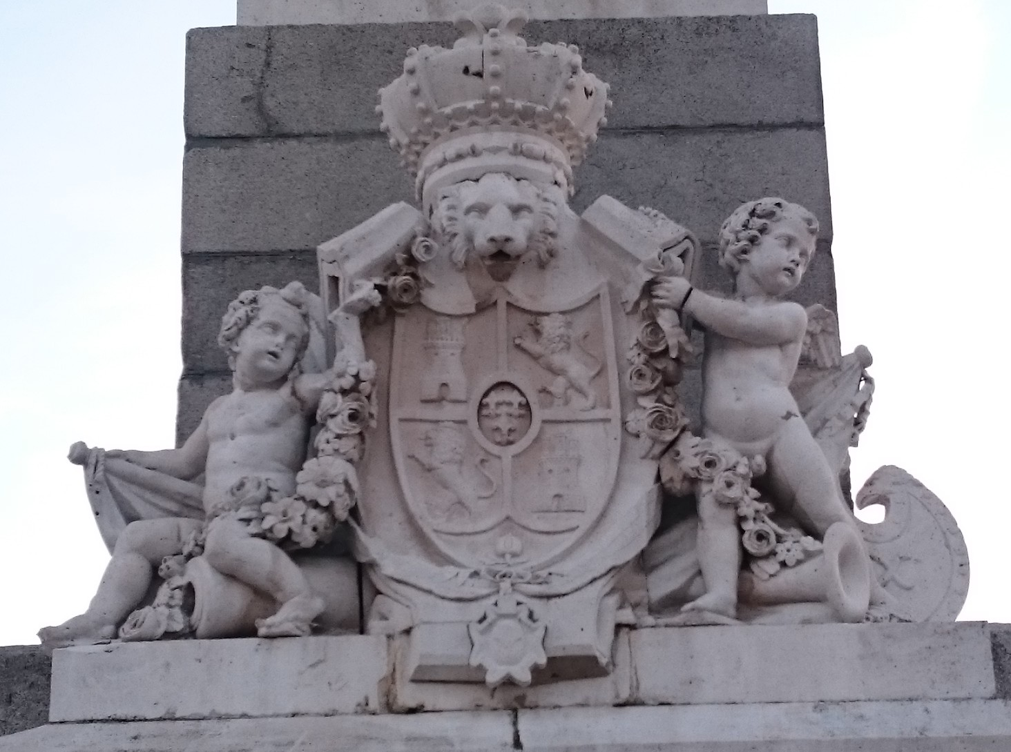 Escudo de armas de la reina Isabel II sostenido por angelotes